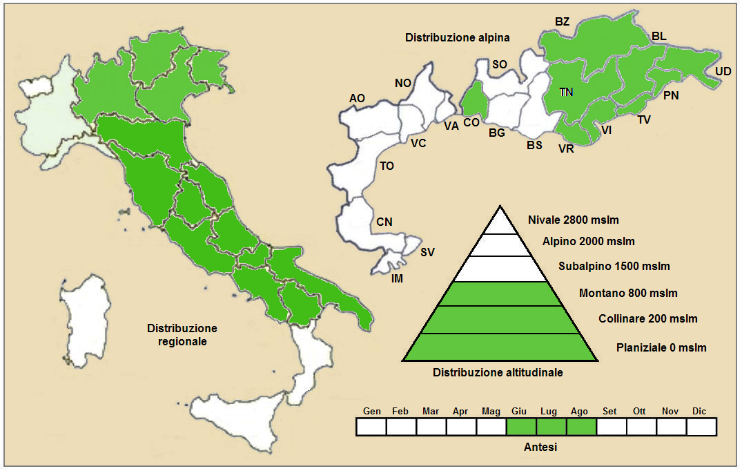 Thalictrum lucidum - Distribuzione